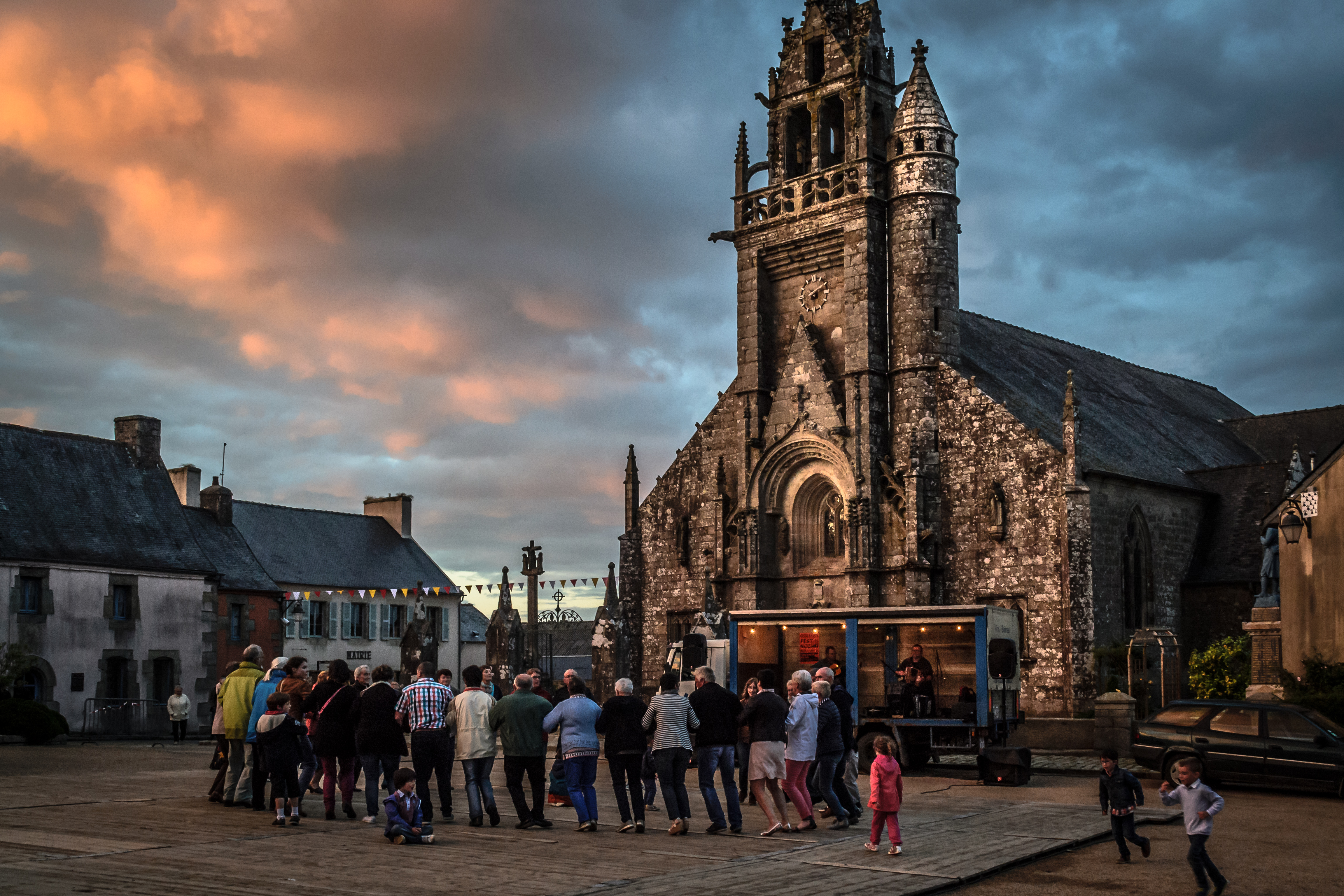 Fest noz spécial « revitalisation du centre-ville » à Guerlesquin le 24 juin 2016 avec Enora De Parscau et Murielle Le Guern.